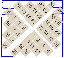 paso 3º para rellenar las casillas de un cuadrado mágico esotérico de lado impar.